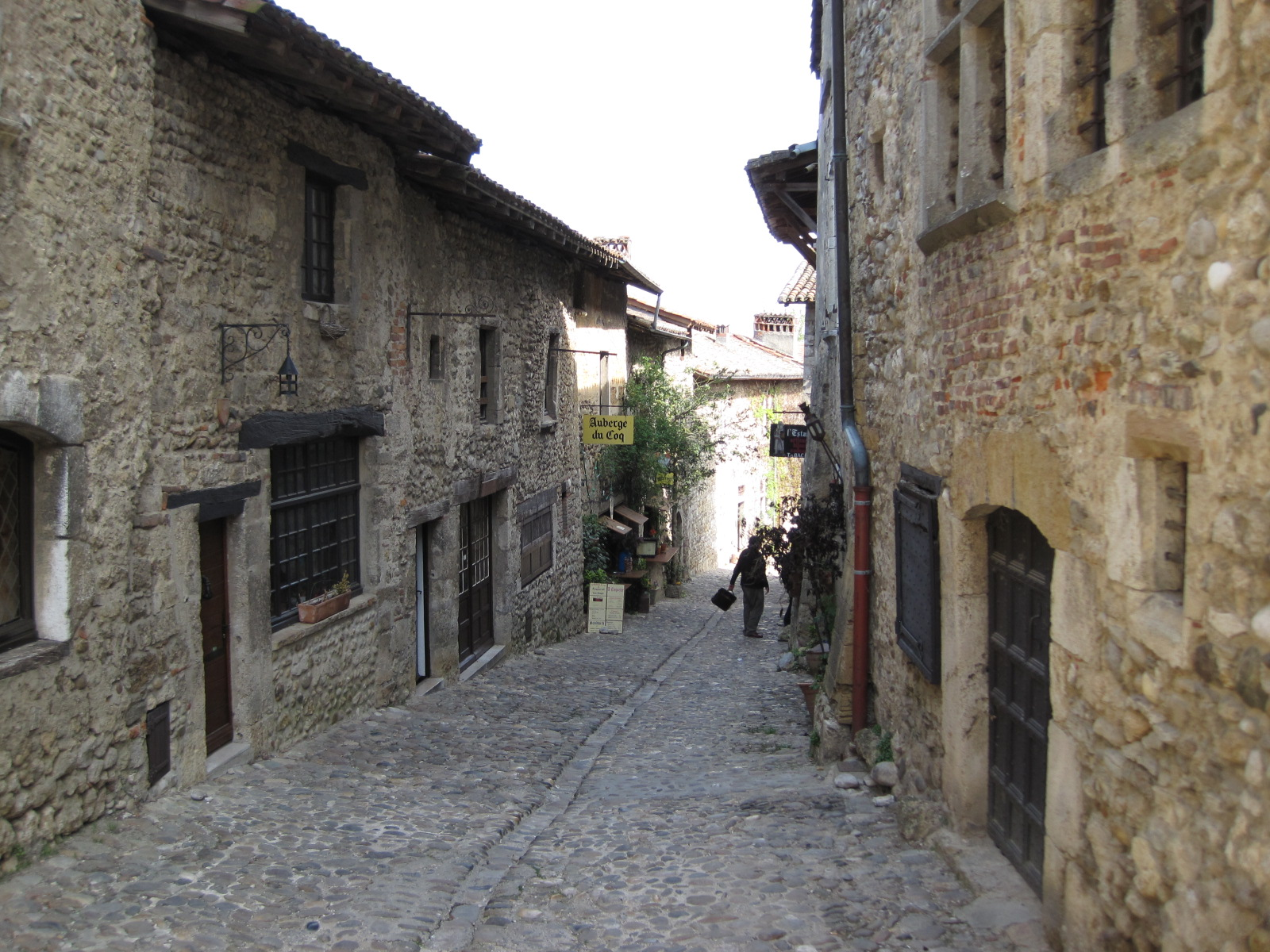 Pérouges